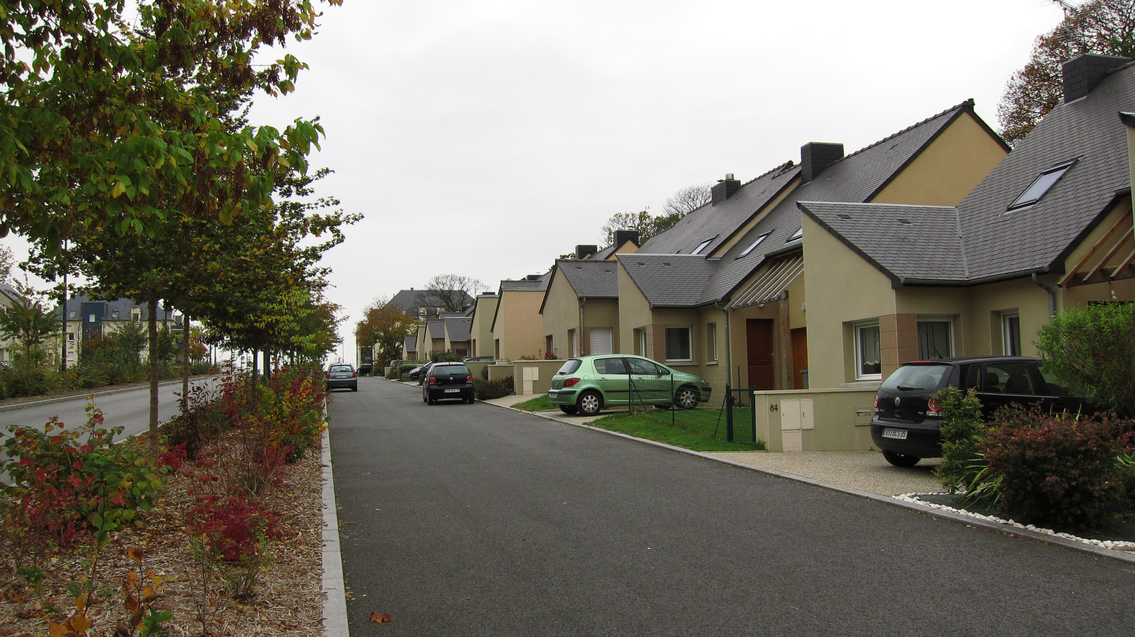 Vitré (Ille-et-Vilaine, Bretagne, France) : Rue de Beauvais.